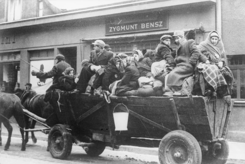 „Polen, Ghetto Litzmannstadt, Deportation Litzmannstadt, Auszug der Juden“ [Polen, Ghetto Litzmannstadt.- Deportation von Juden ins Ghetto, Pferdekarren]